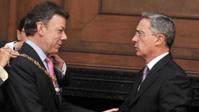 El expresidente de Colombia, Álvaro Uribe condecorando a su sucesor, Juan Manuel Santos con la Orden de Boyacá.